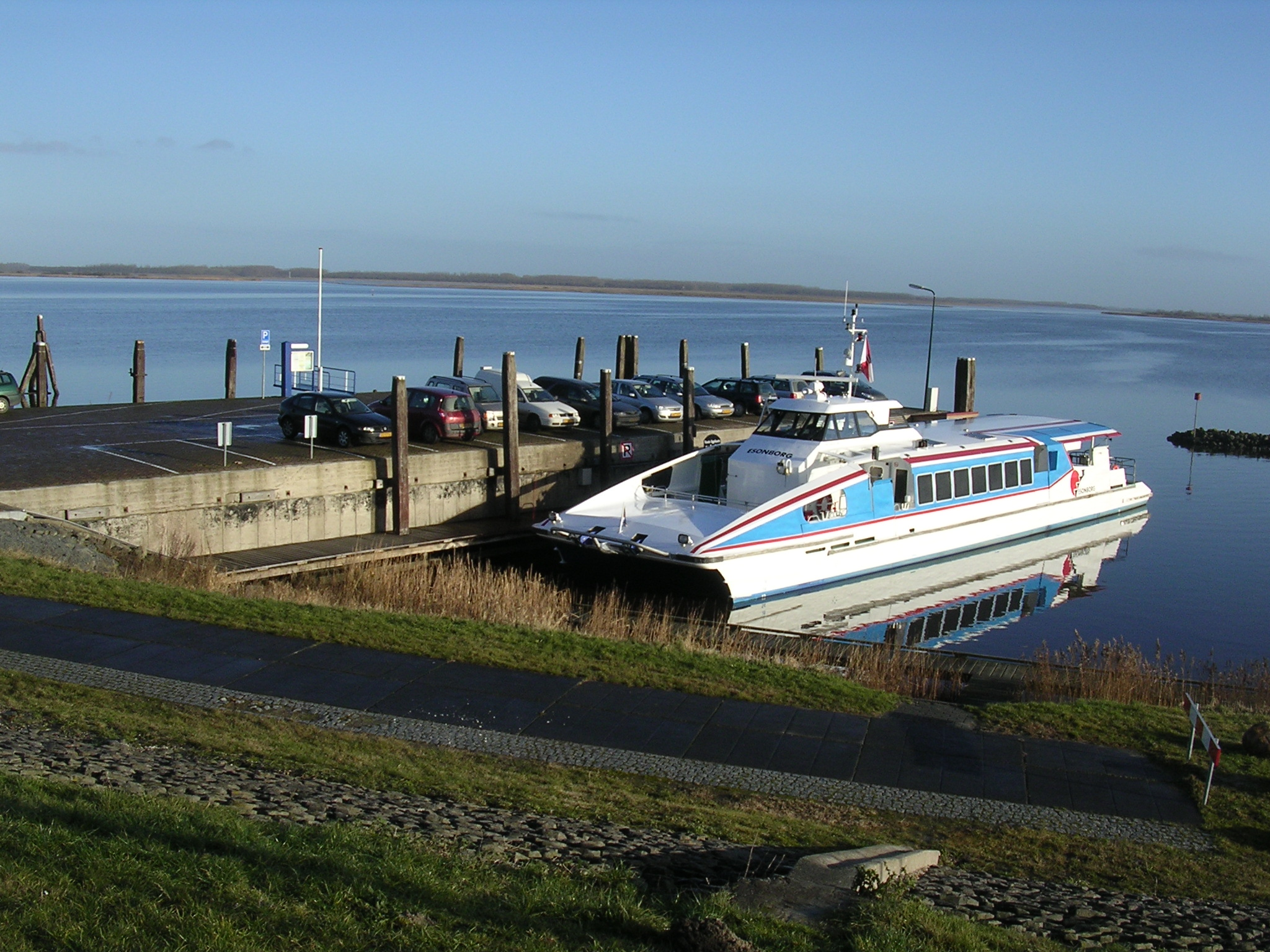 Feardaam op de Skans (ferryboat at Oostmahorn)